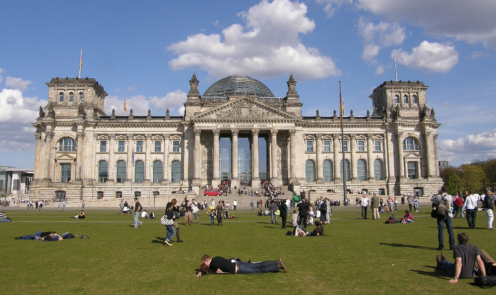 Der Rechtstag